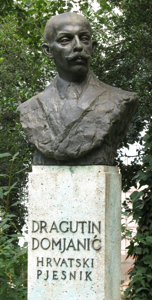 Bista Dragutina Domjanića na Strossmayerovom trgu u Zagrebu